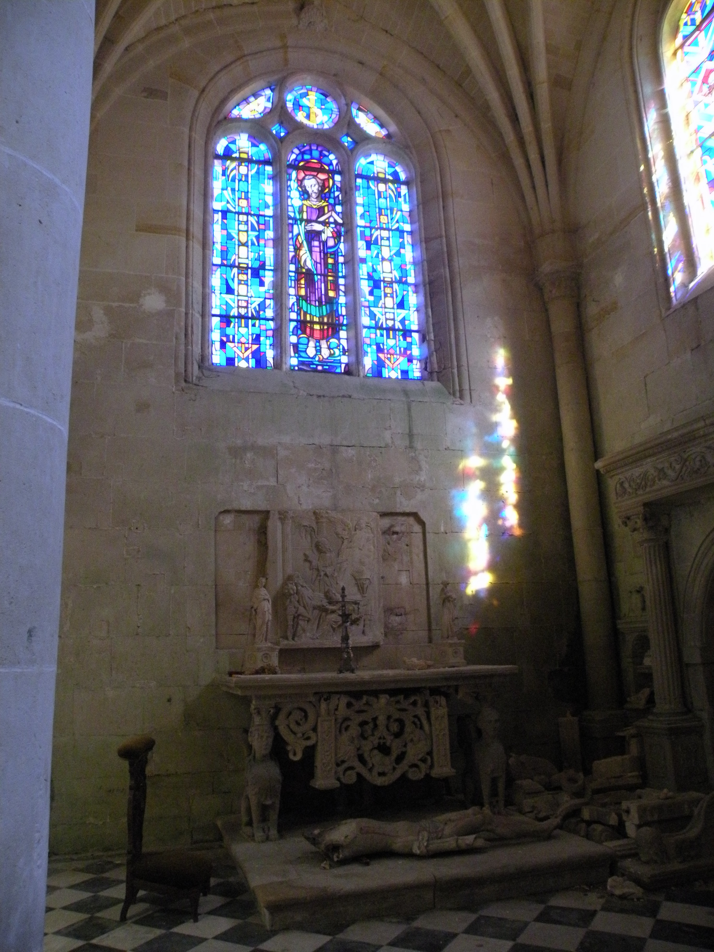 Chapelle latérale sud, autel de saint Joseph.